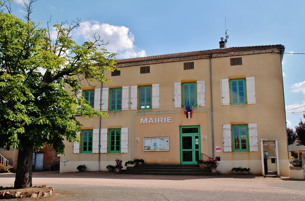 La Mairie